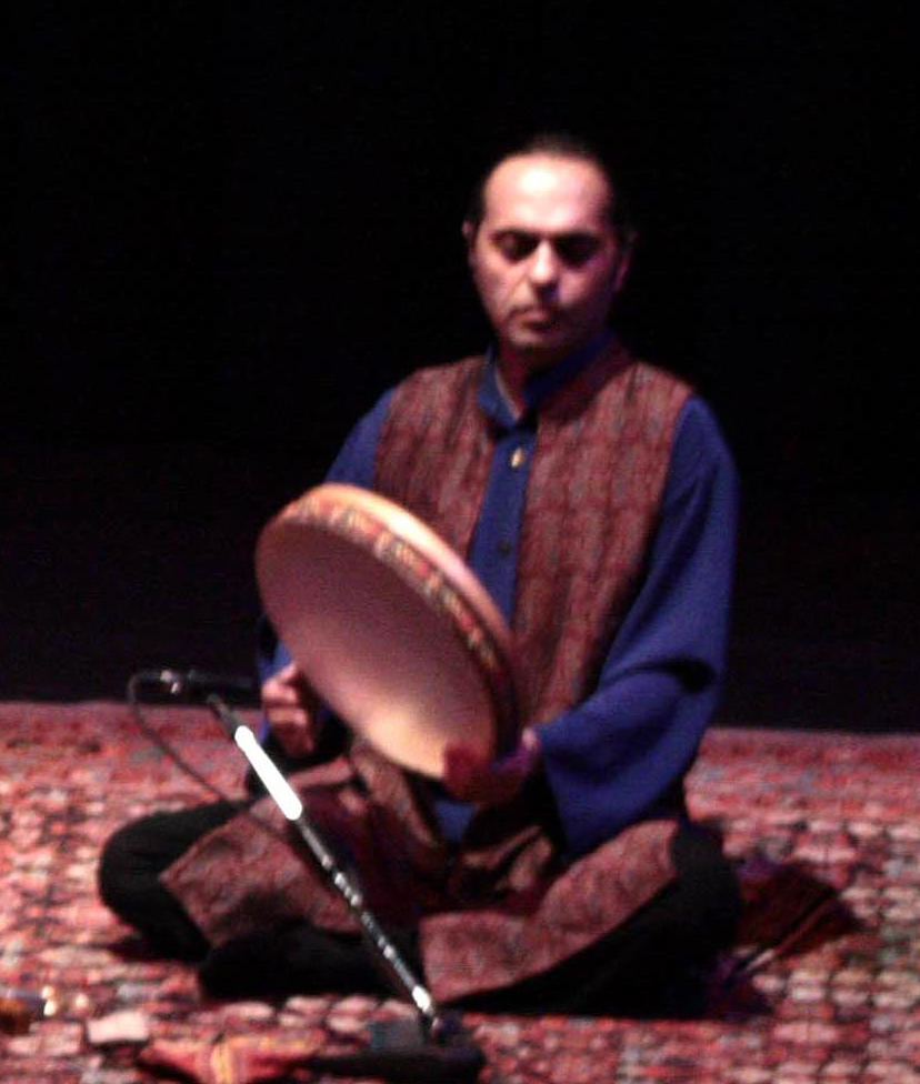 Own photo based on File:Khalaj- alizadeh-kalhor.jpg Dayereh